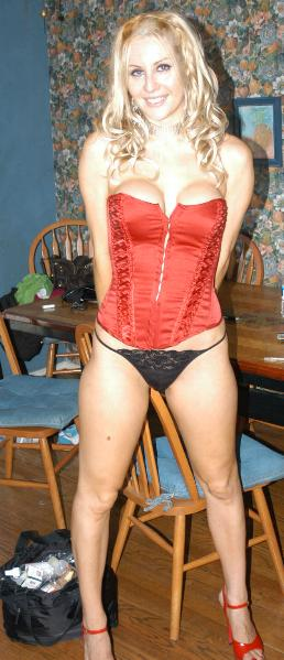 Celestia Star On Set With Annette Schwarz, August 21, 2006